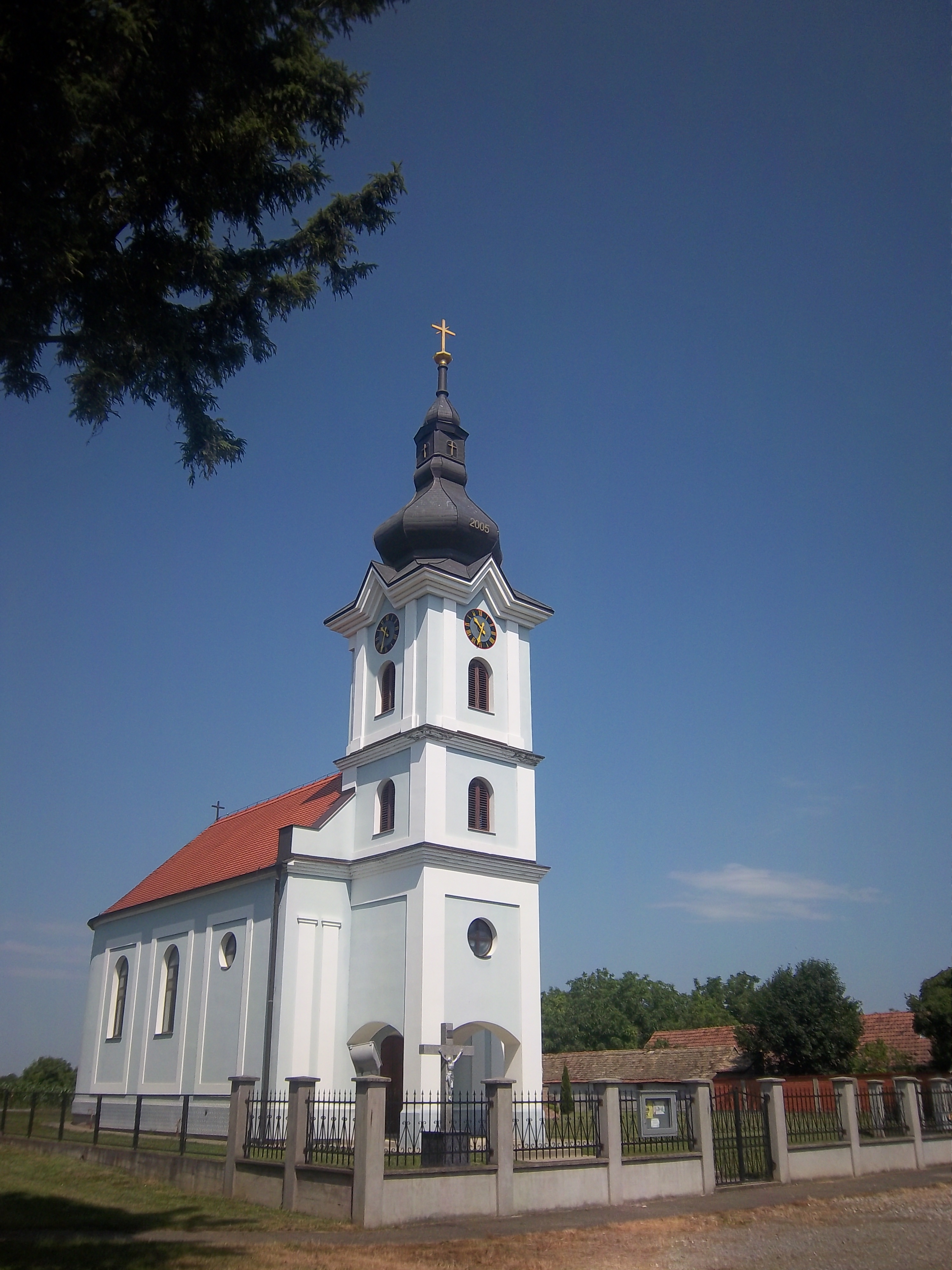 Srpskohrvatski / српскохрватски: Rimokatolička crkva u naselju Čakovci u Općini Tompojevci u Vukovarsko-srijemskoj županiji (Republika Hrvatska).